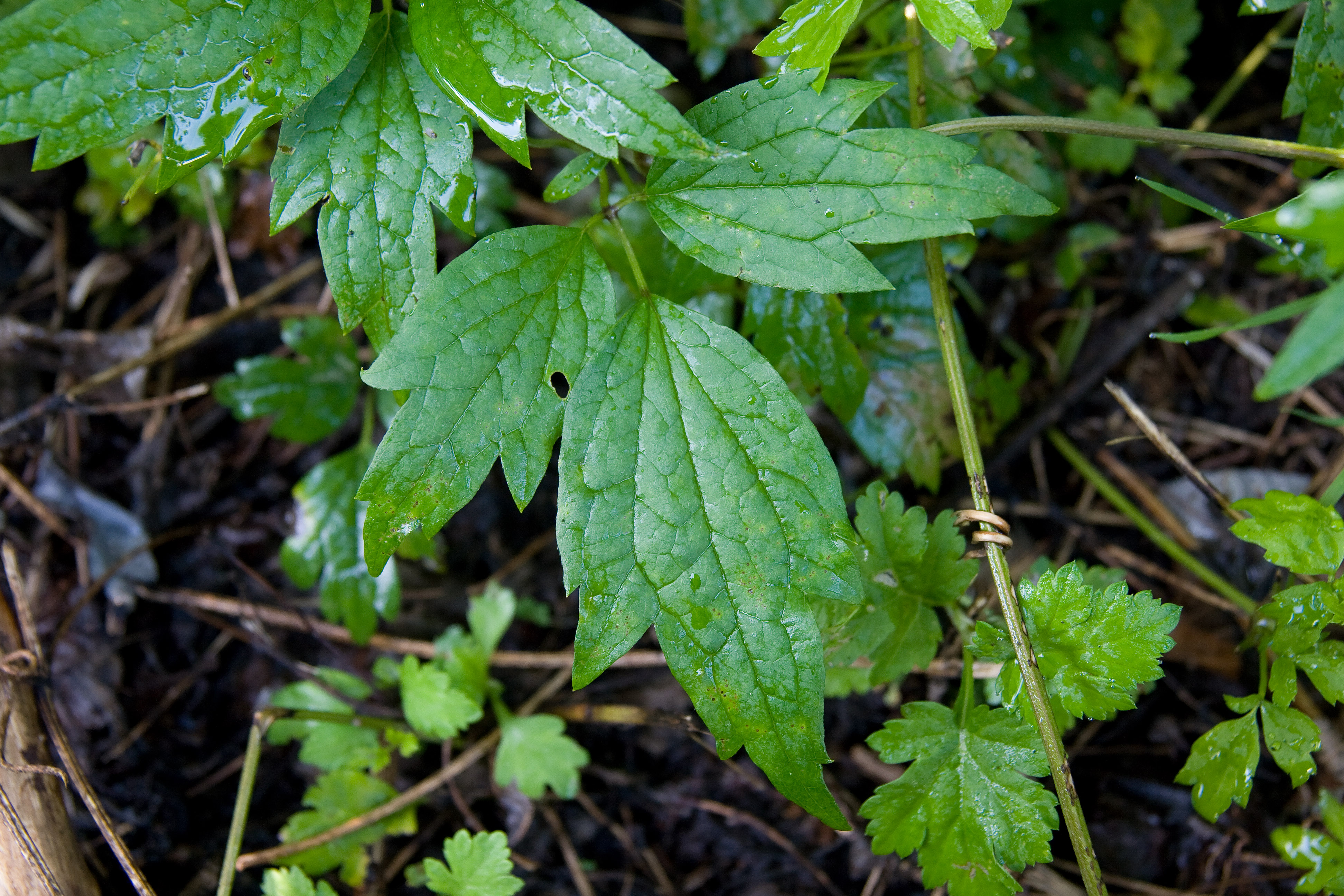 ボタンヅル (学名:Clematis apiifolia)